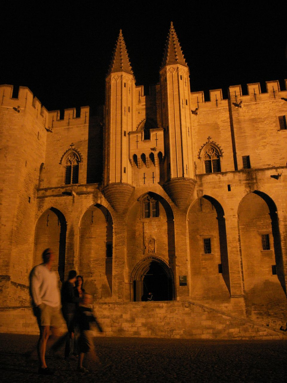 Palais des papes en Avignon